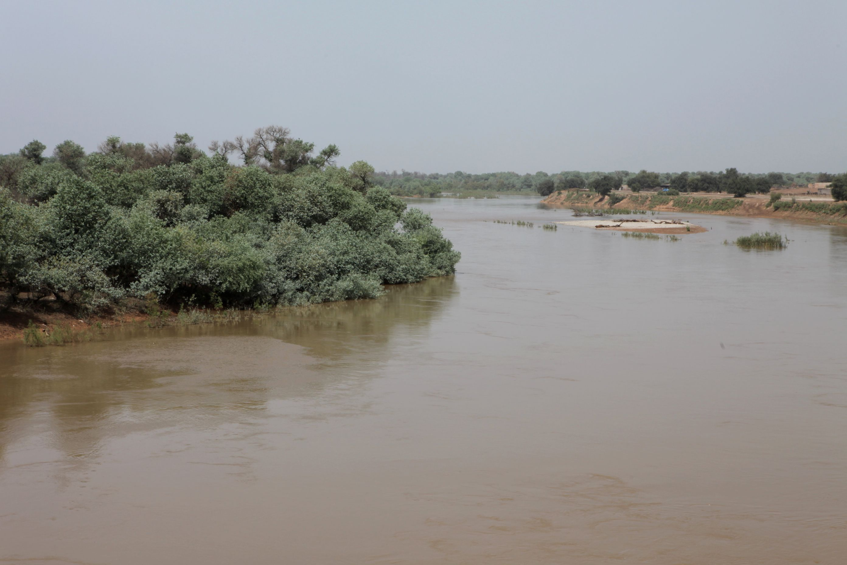 Karun river, Shush, Khuzestan